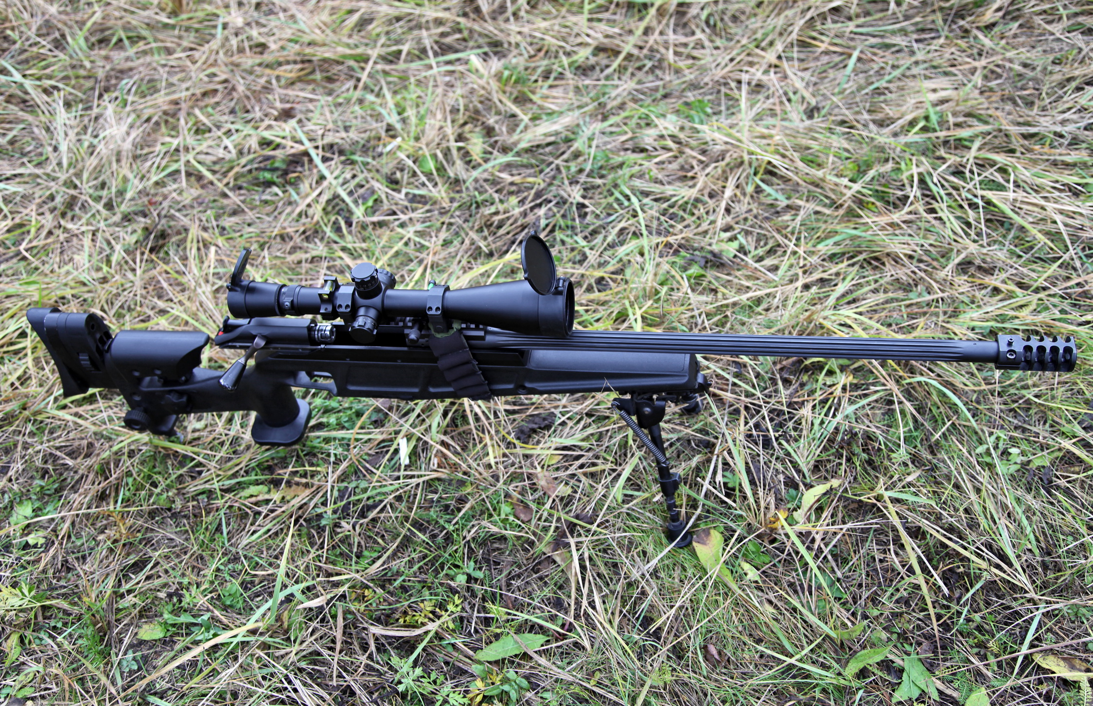 Blaser R93 LRS2 .308 Win